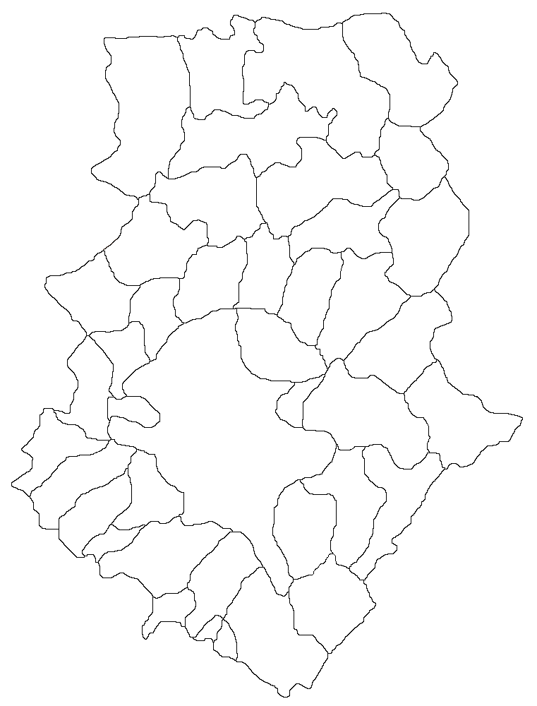 Harta judeţul Ilfov